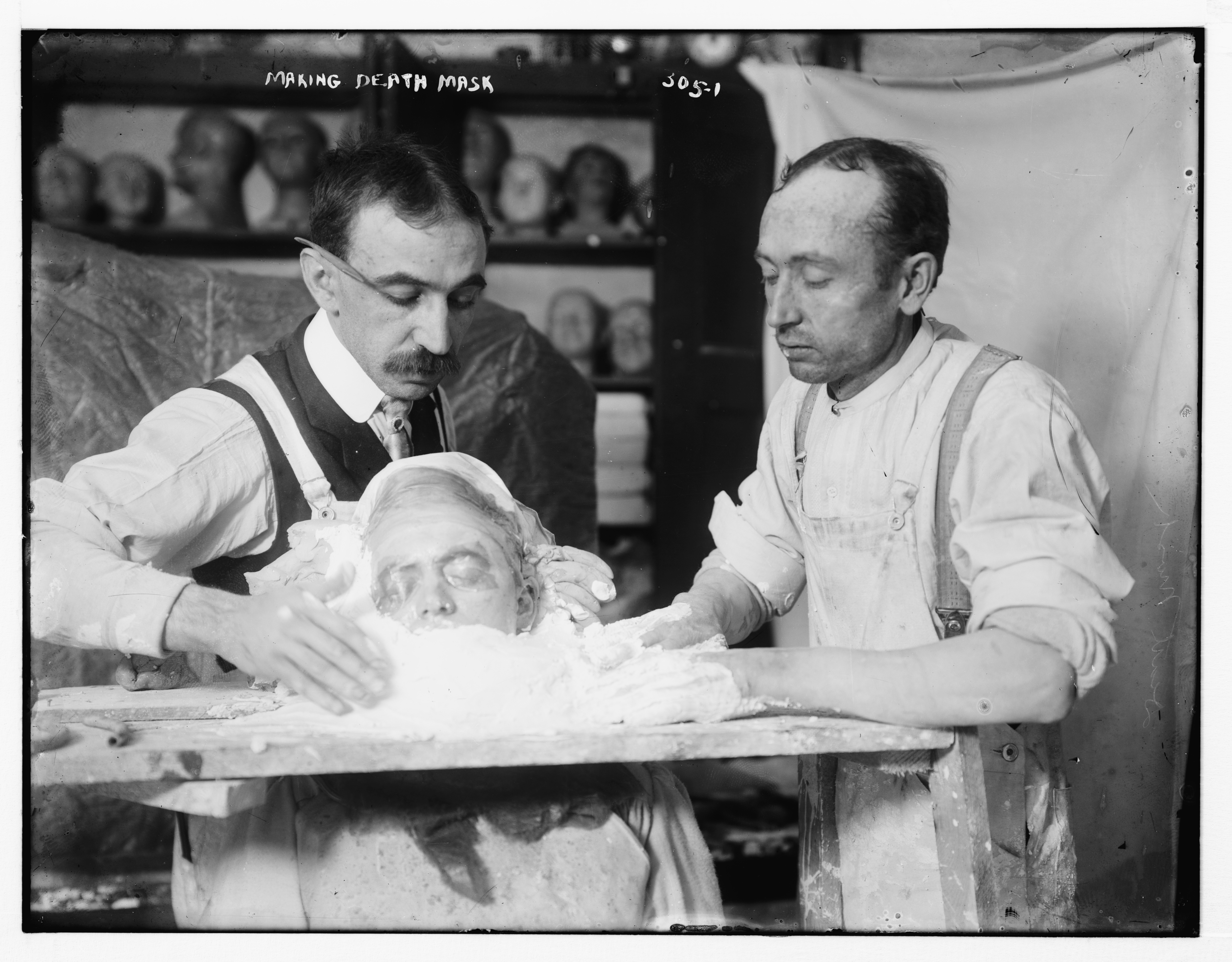 Two men making a death mask